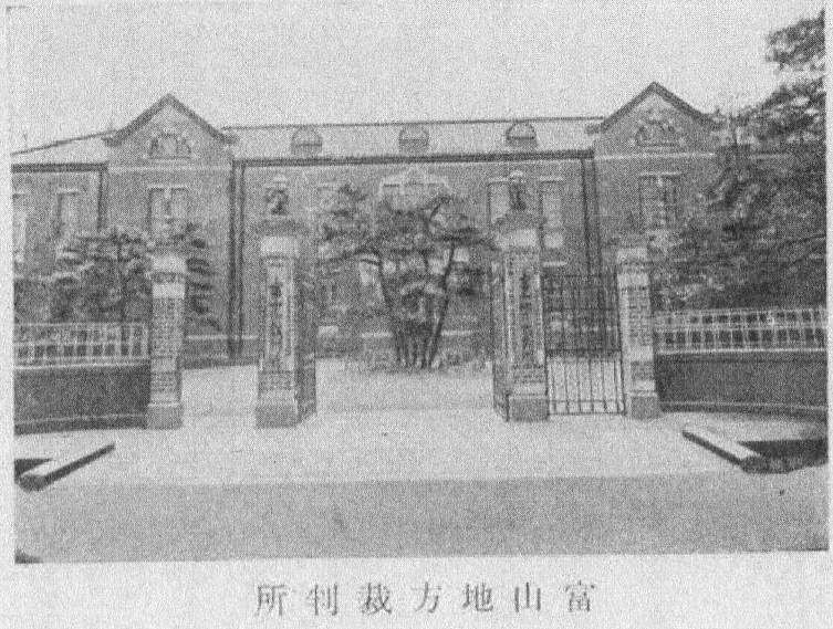 1917年（大正6年）6月西田地方に竣工の富山地方裁判所